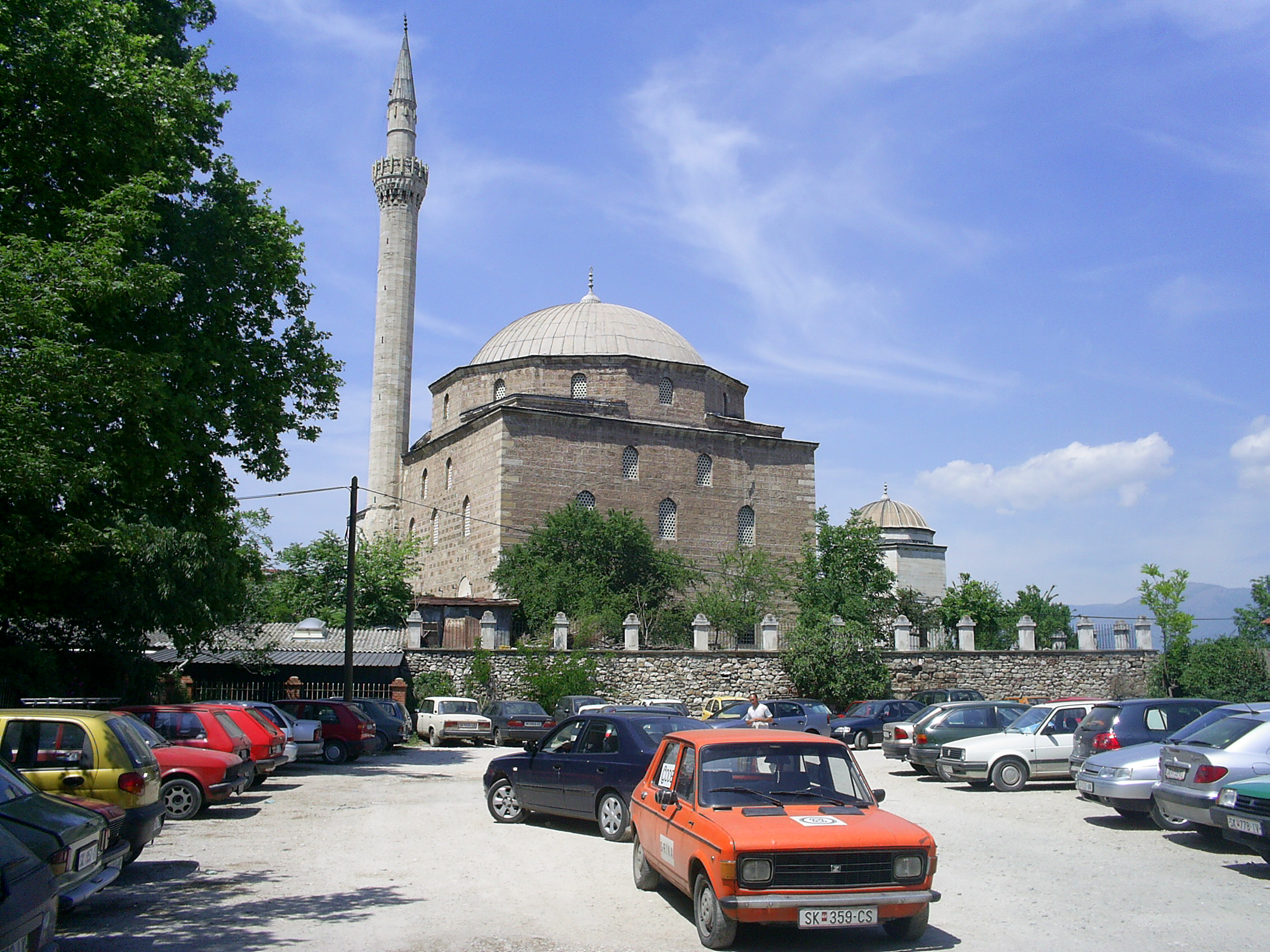 Мустафа паша джамия в Скопие, Република Македония.